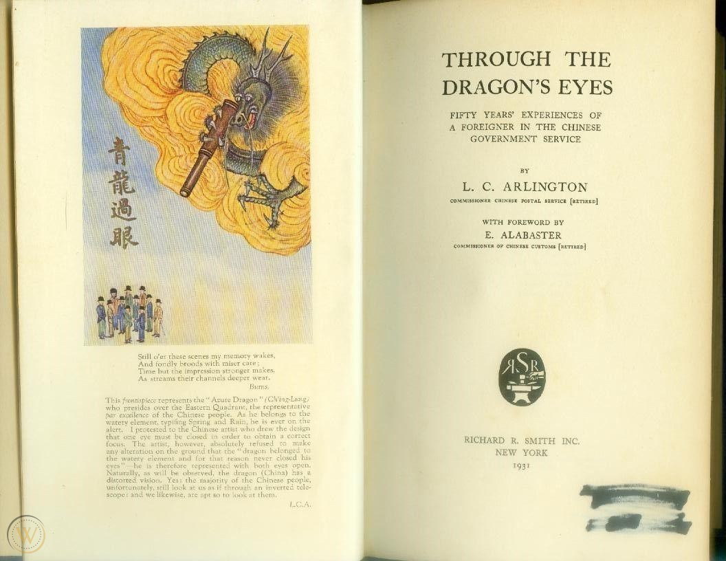 劉易斯·查爾斯·阿靈頓著《青龍過眼》內頁